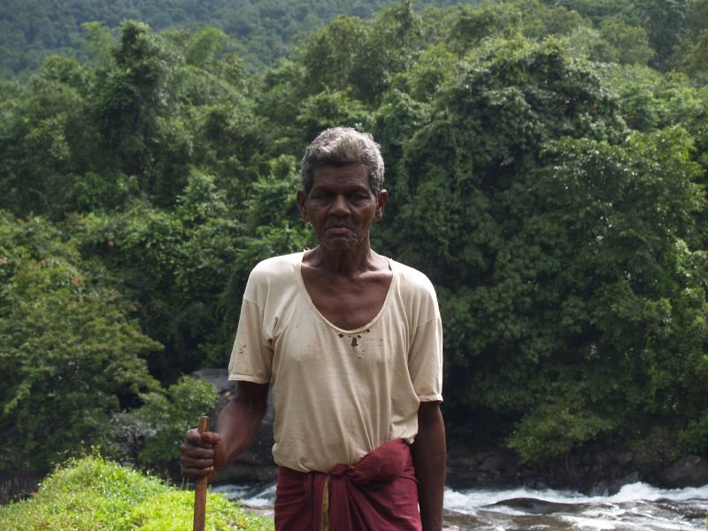 A Cholanaikkan Nilambur